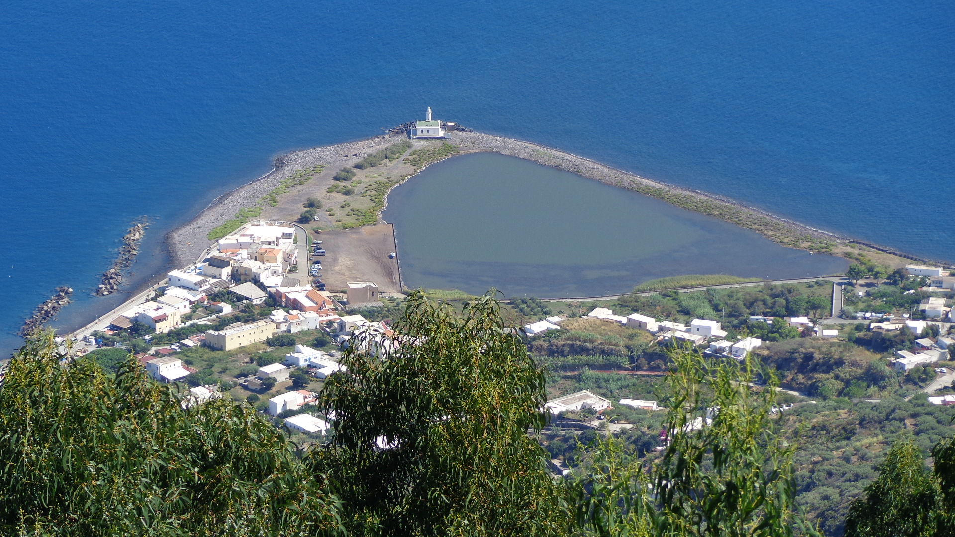 Laghetto di Lingua visto dalla Fossa delle Felci